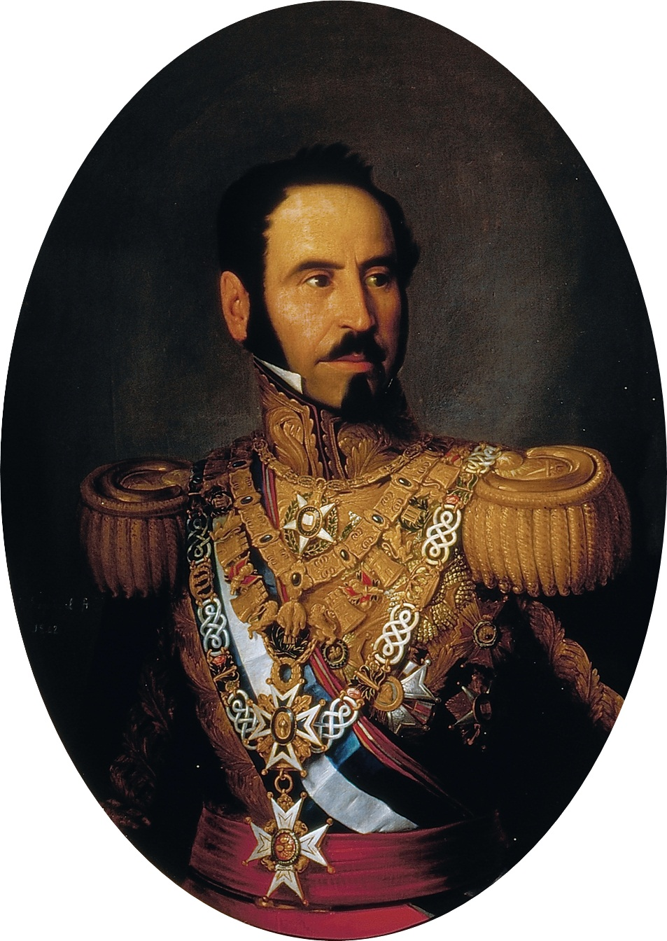 Retrato del general español Baldomero Espartero (1793-1879), que llegó a ostentar los títulos de príncipe de Vergara y duque de la Victoria.